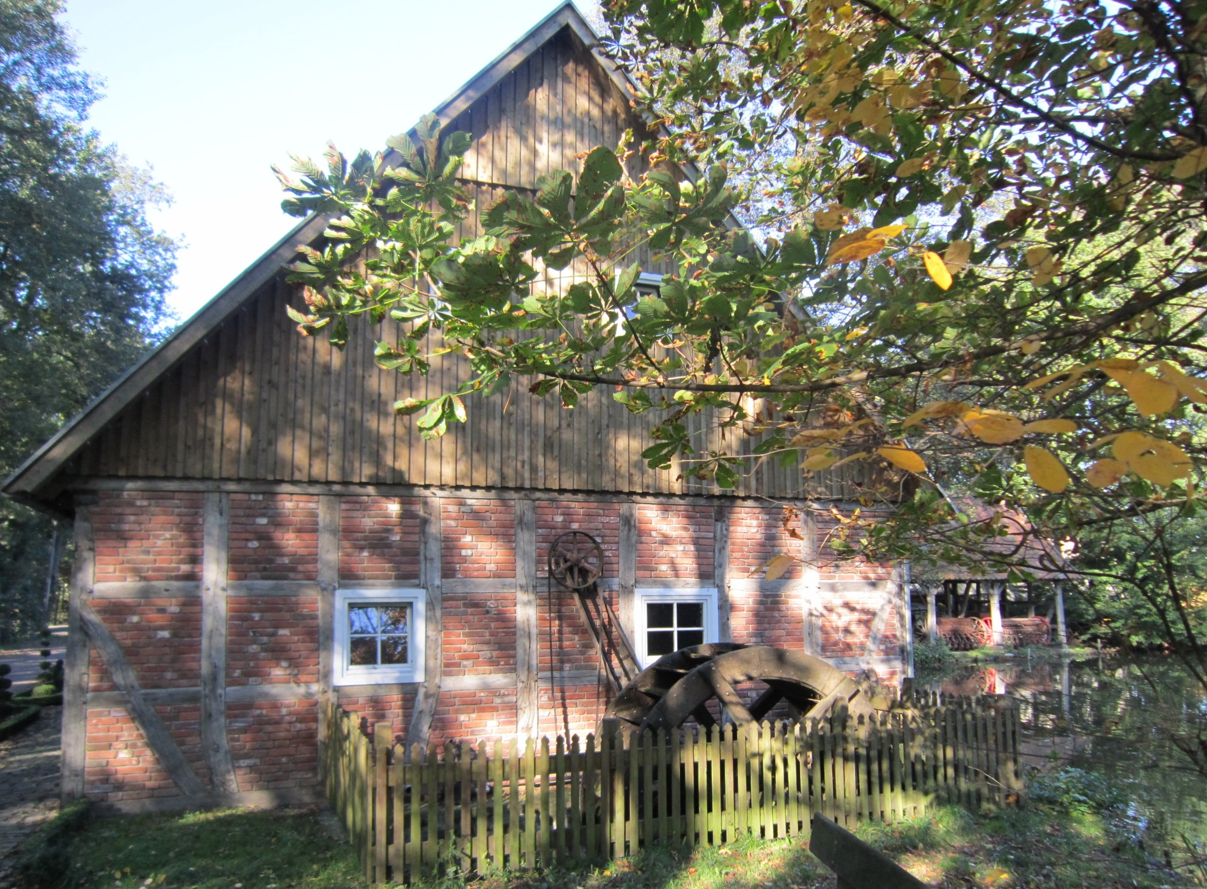 Wassermühle "Pöhlkings Mühle" in Düpe, Gemeinde Steinfeld (Oldenburg)